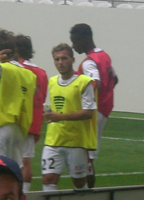 Christophe Vincent (#22) avant le match Lens / AC Ajaccio, le 11 août 2015, au Stade Bollaert-Delelis, comptant pour le premier tour de la Coupe de la Ligue française de football.